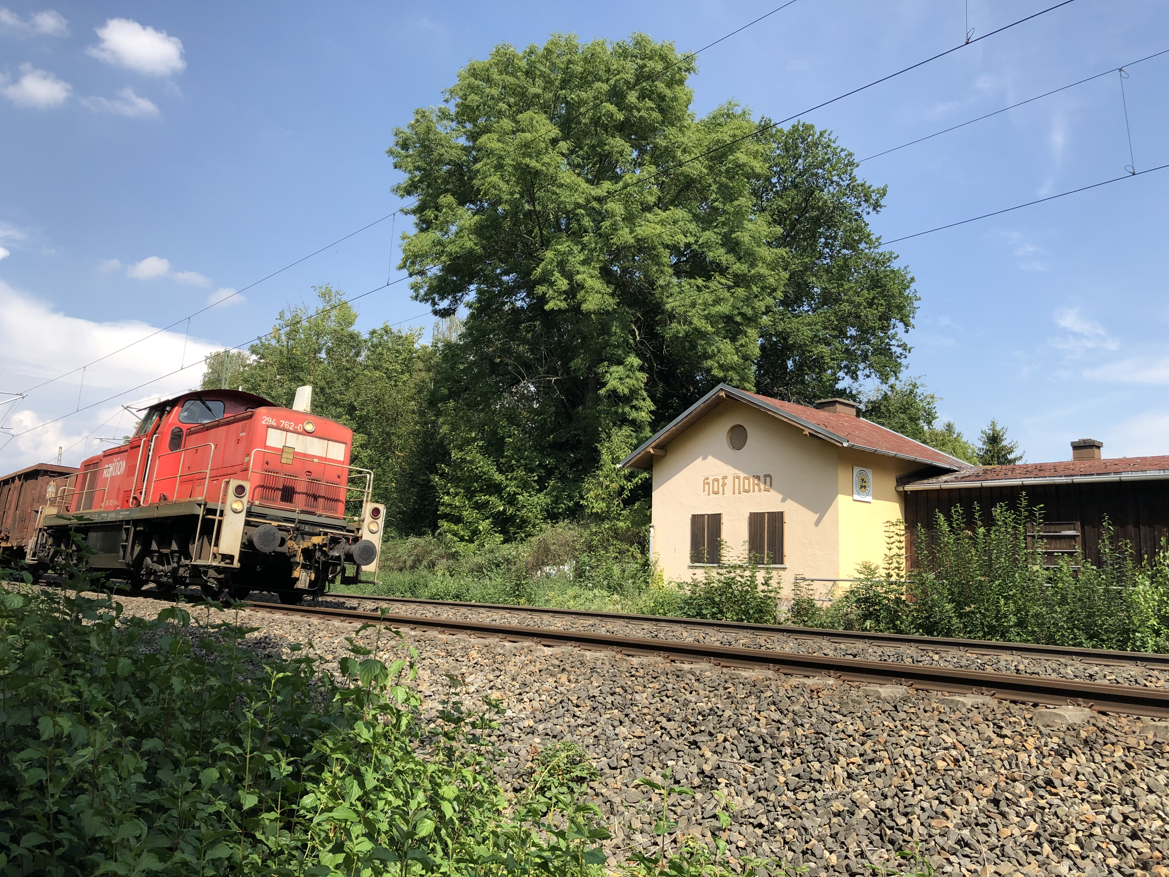 Ehemaliger Haltepunkt Hof-Nord, Empfangsgebäude mit Zug (2019)